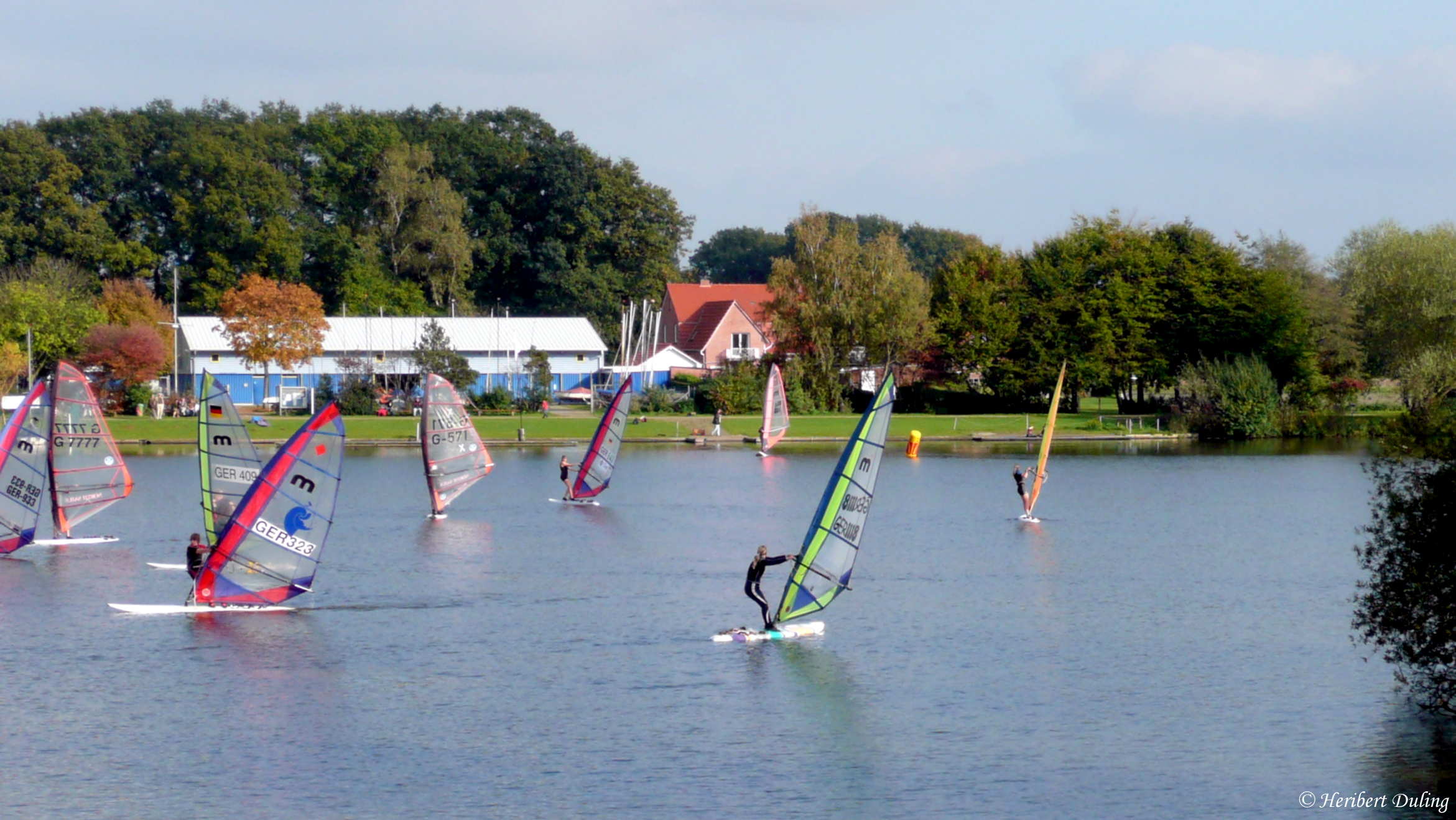 Wassersport